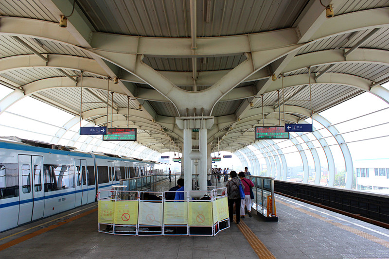 中文（中国大陆）: 武汉地铁1号线